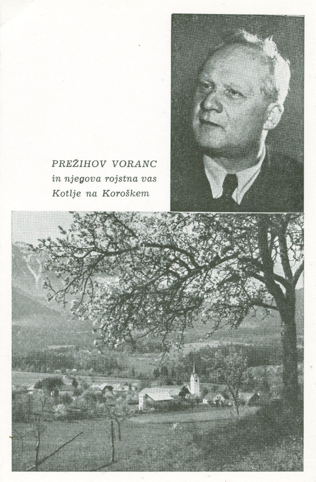 Razglednica Kotelj.